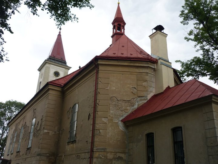 Kostel svatého Jana Křtitele v Kořenově-Polubném